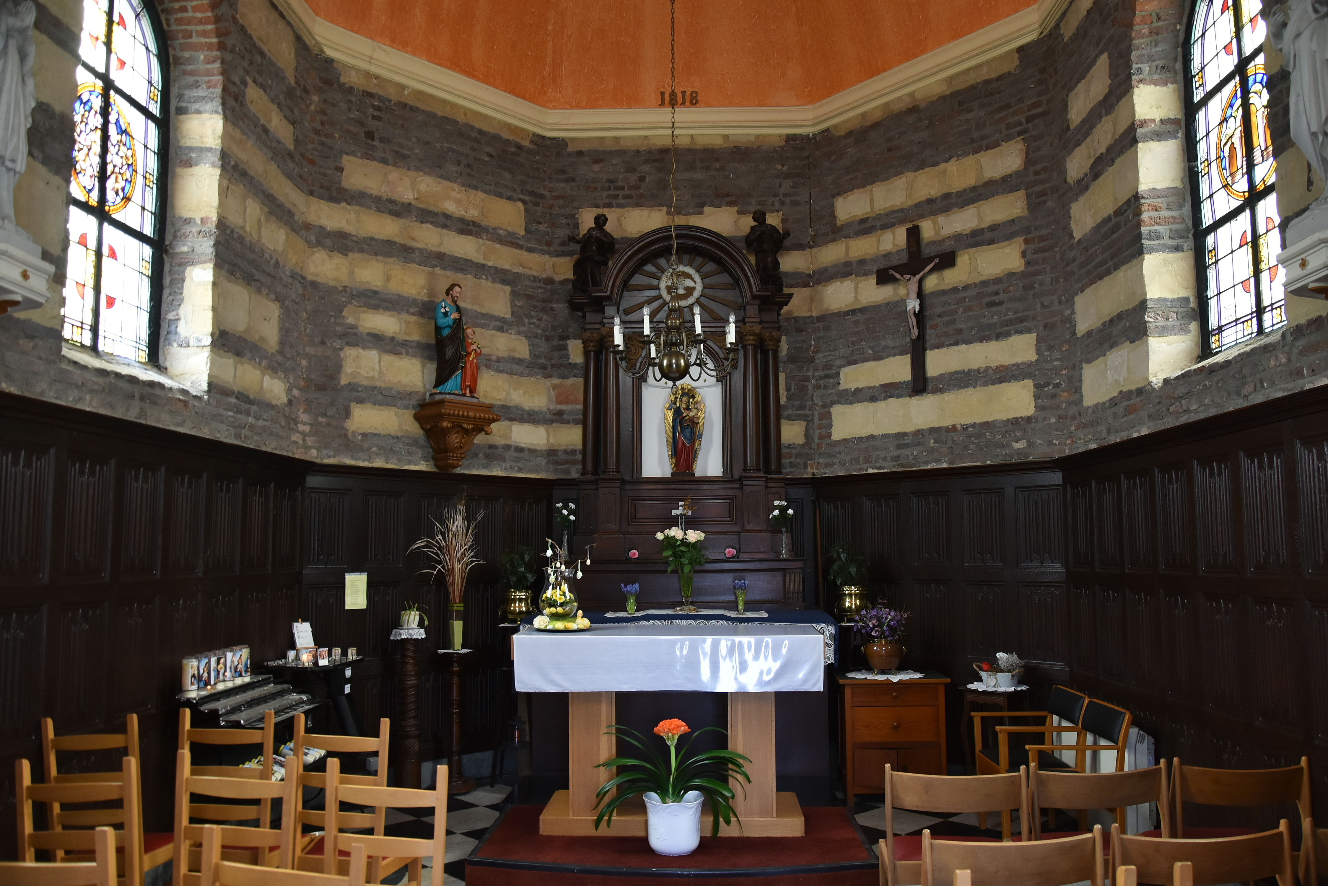 Kapel Onze-Lieve-Vrouw van Bijstand Stokkem 5-04-2019 15-45-58